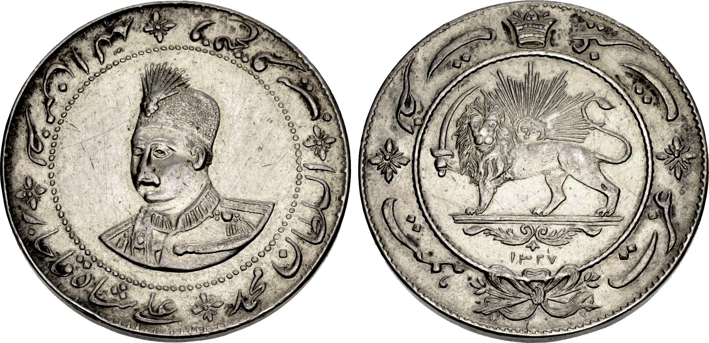 مدال نقره غیرت عزت همت نصرت محمدعلی شاه